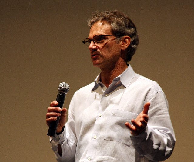 Jon Krakauer en octobre 2009 à la Dobson High School.